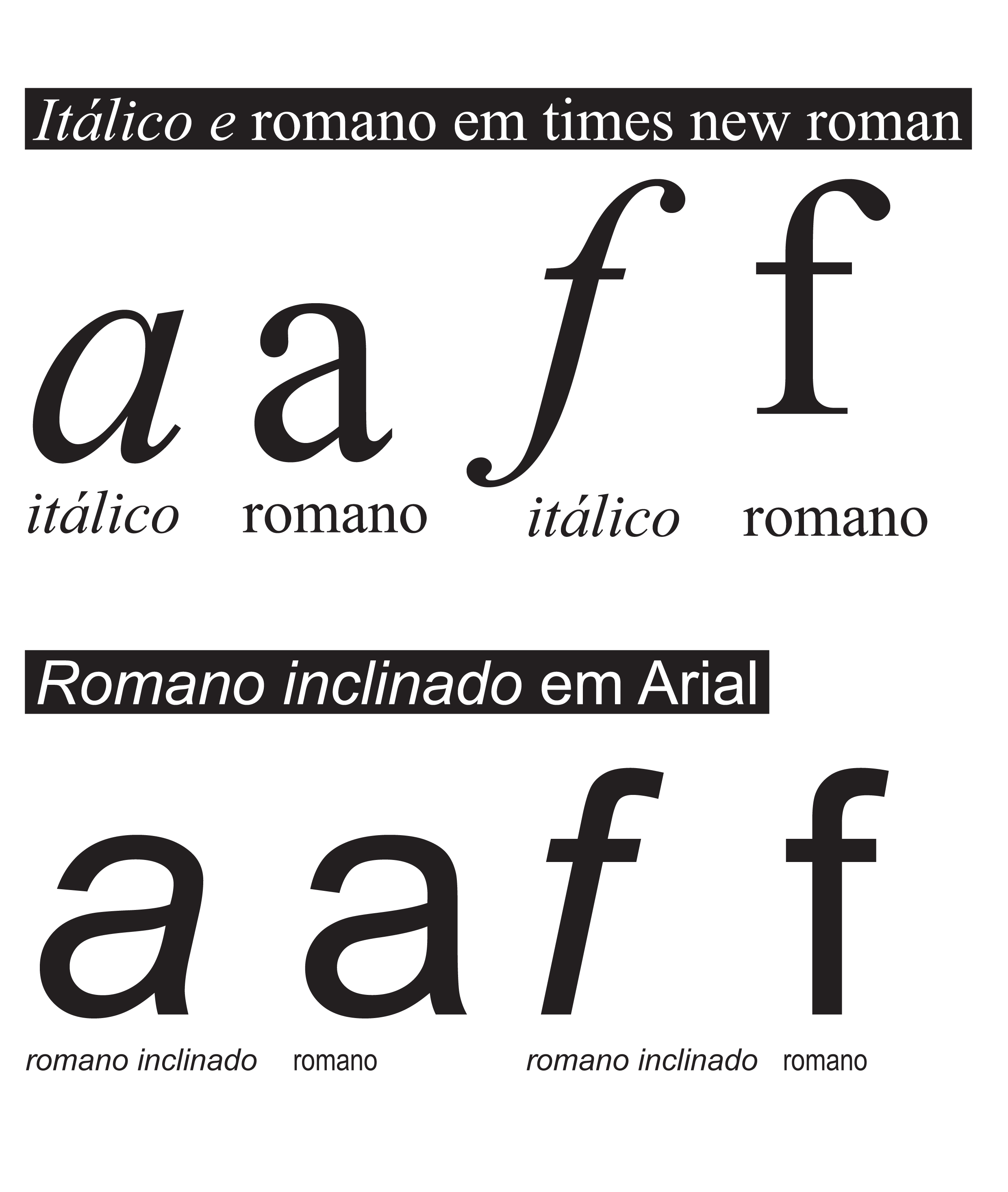 Itálico e romano em times e arial